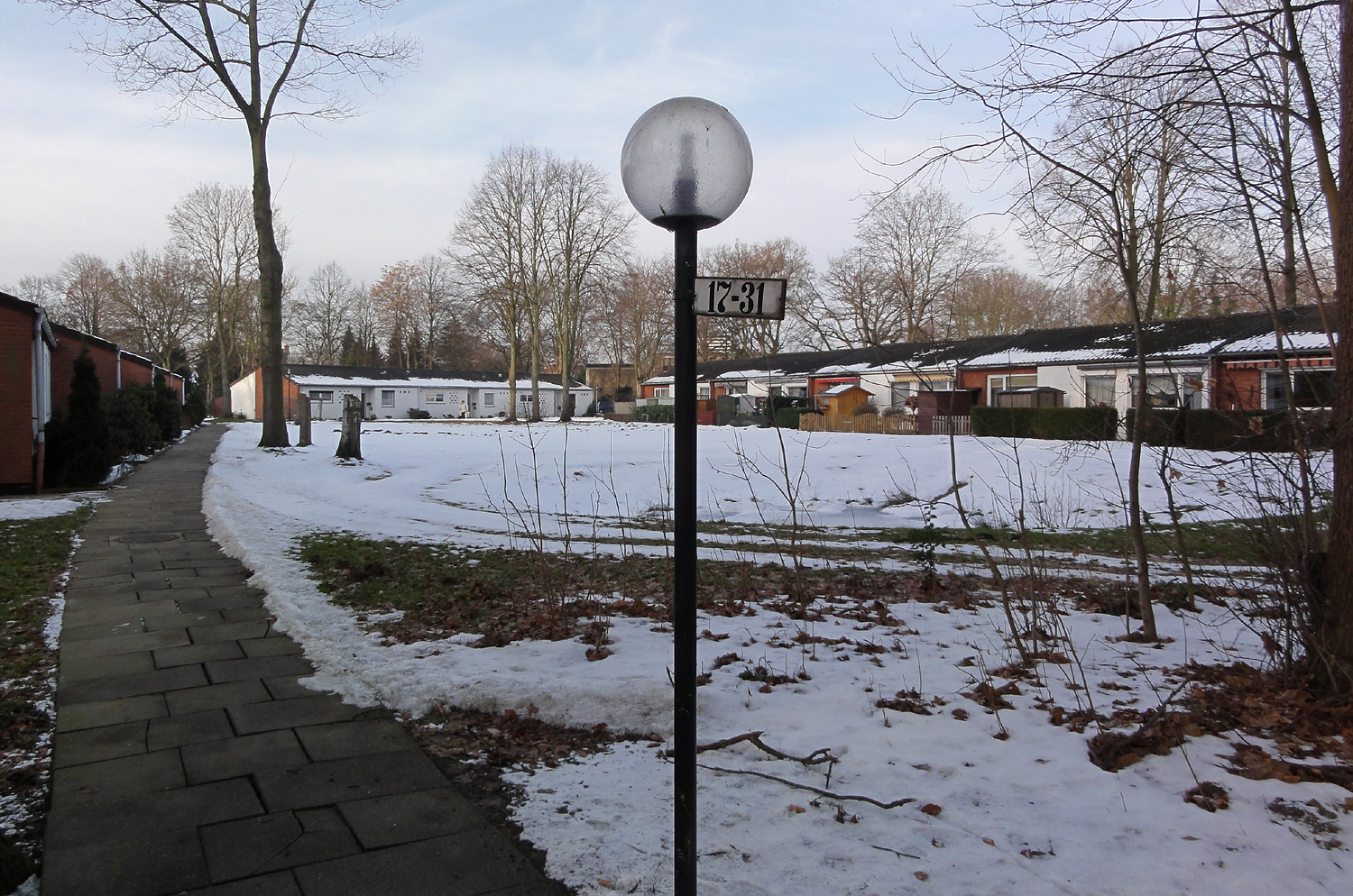 Egestorff-Stiftung in Bremen: Altenwohnungen, erbaut ab 1962